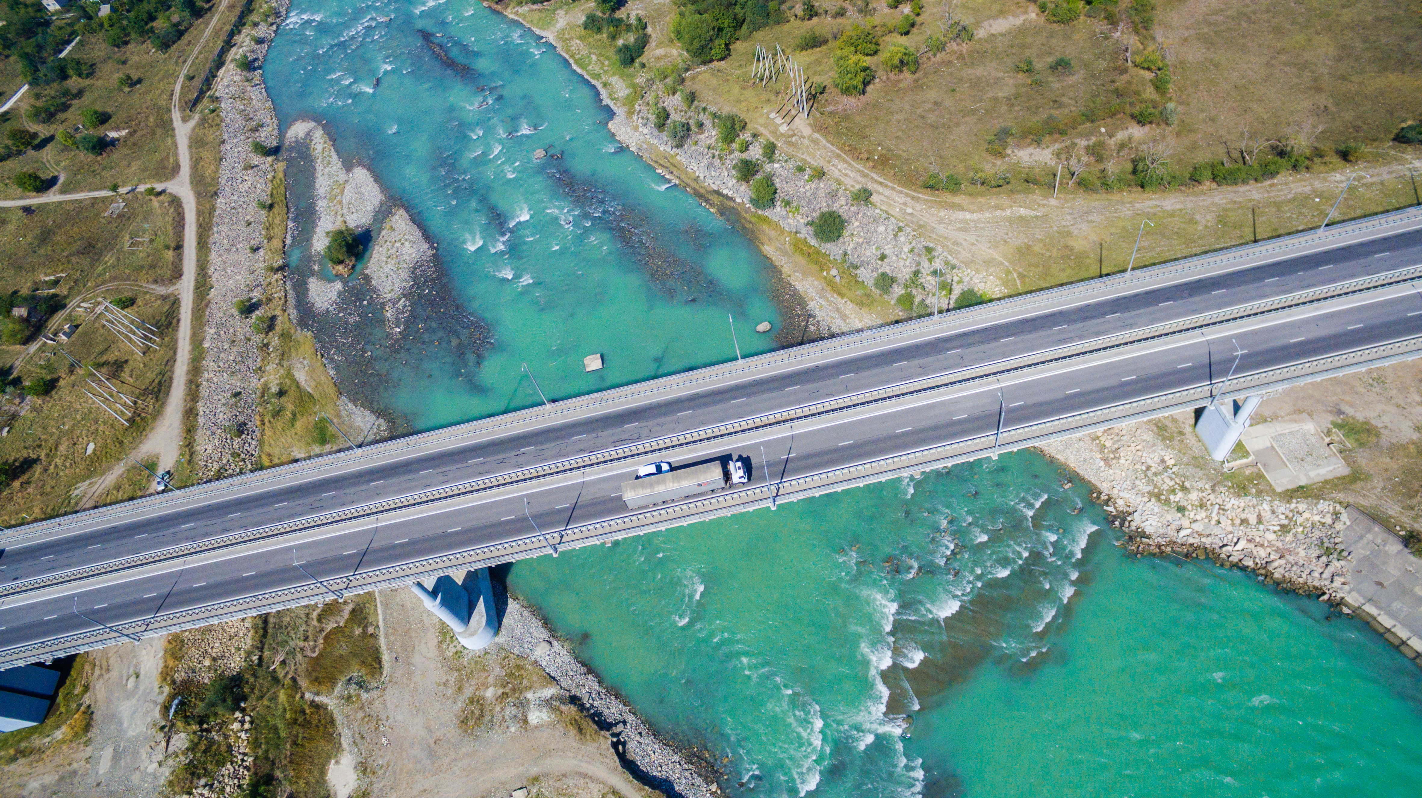 Федеральная автомобильная дорога А-155 «Черкесск-Домбай», 19 км (Республика Карачаево-Черкессия)